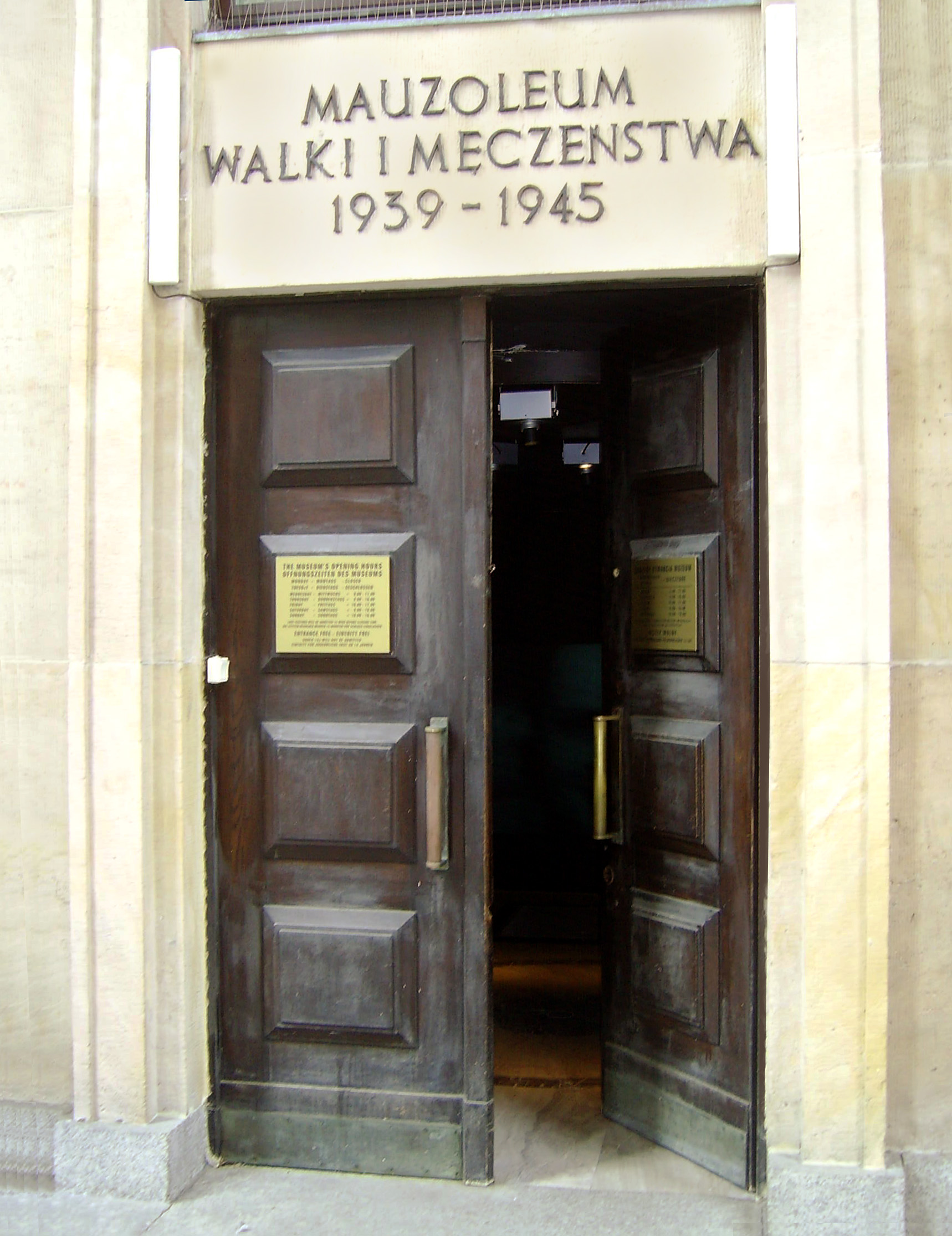 Główne wejście do Mauzuleum Walki i Męczeństwa przy al. Szucha 25 w Warszawie